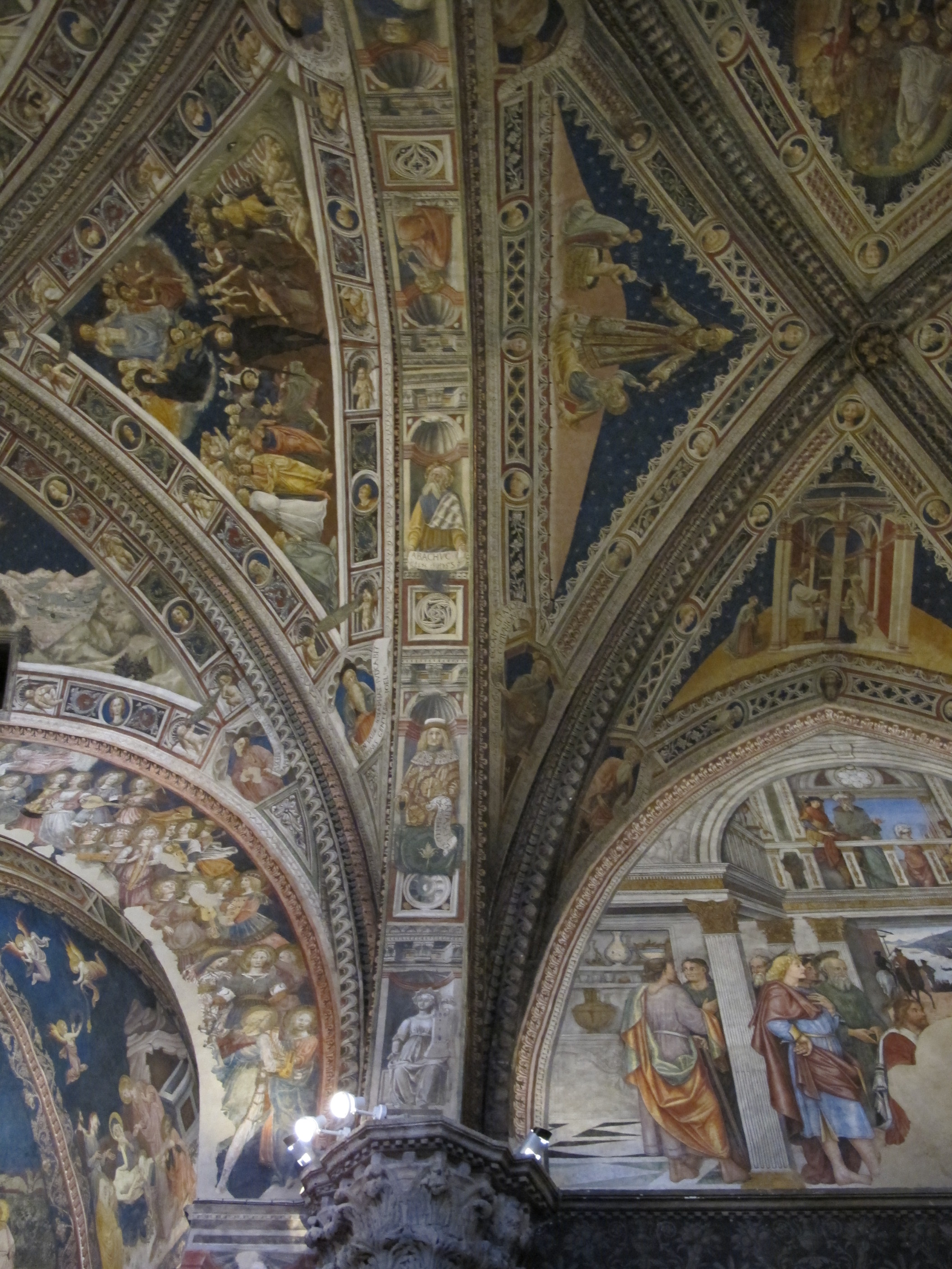 Battistero, arcone B